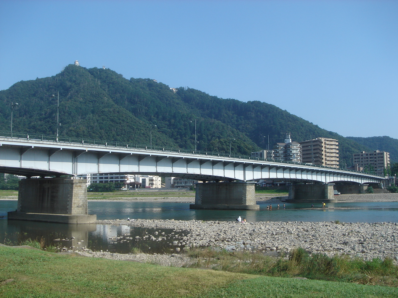 Nagara Bashi(長良橋),Gifu,Gifu,Japan(岐阜県岐阜市)で長良川の右岸下流の長良川公園より撮影。